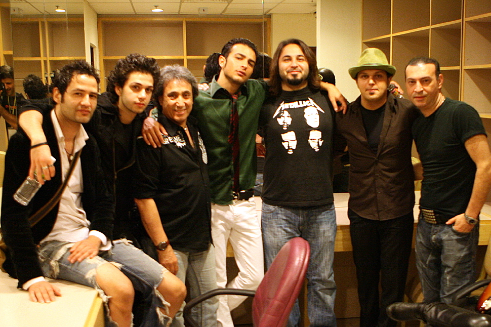 Black cats concert Kuala lumpur 2009